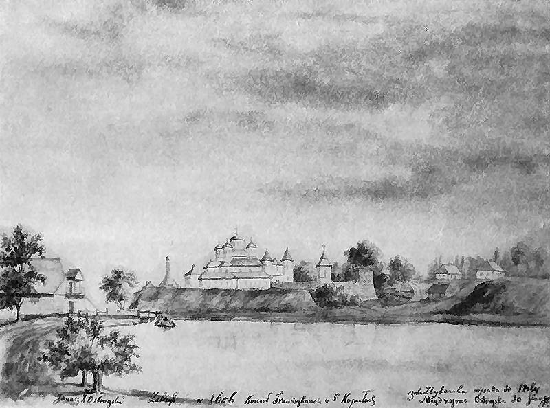 MIĘDZYRZECZ OSTROGSKI. Kościół i klasztor pofranciszkański. Widok od strony rzeki Zbytenki. W obrębie murów obronnych z basztami na narożach i czworokątnym budynkiem bramnym, kościół z wieżami i z kopułami na wysokich bębnach oraz zabudowania klasztorne. Dat. Międzyrzec Ostrogski 30 Sierp. Napis: Janusz X. Ostrogski Założył r 1606 Kościół Franciszkański o 5 Kopułach; rzeka Zbytenka wpada do Wilij; napis na podkładzie: Wołyń Międzyrzec Ostrogski kościół Franciszkanów. 1862-1876. Rys. ołówkiem podmalowany akwarelą. 20,5 x 27,7 cm. Muzem Narodowe, Kraków. III-r.a. 4186 (Teka Wołyń).